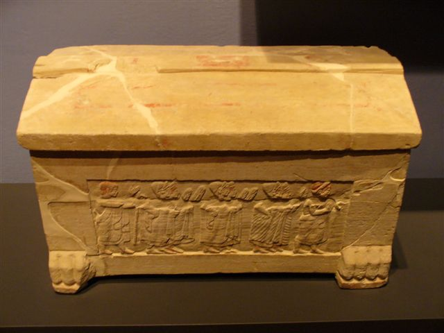 urna etrusca in pietra fetida,museo etrusco di Chiusi SI